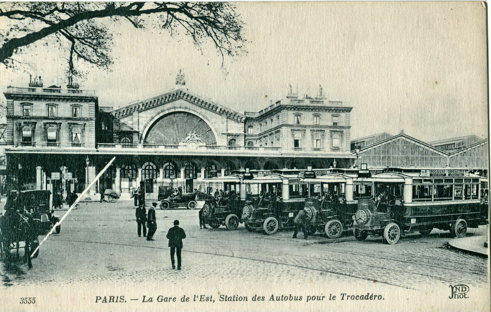 Carte postale ancienne éditée par ND Phot, N° 3555Paris : La Gare de l'Est, station des autobus pour le TrocadéroLes bus portent la livrée de la CGO, ancêtre de la RATP ; Ligne B Trocadéro — Gare de l'Est